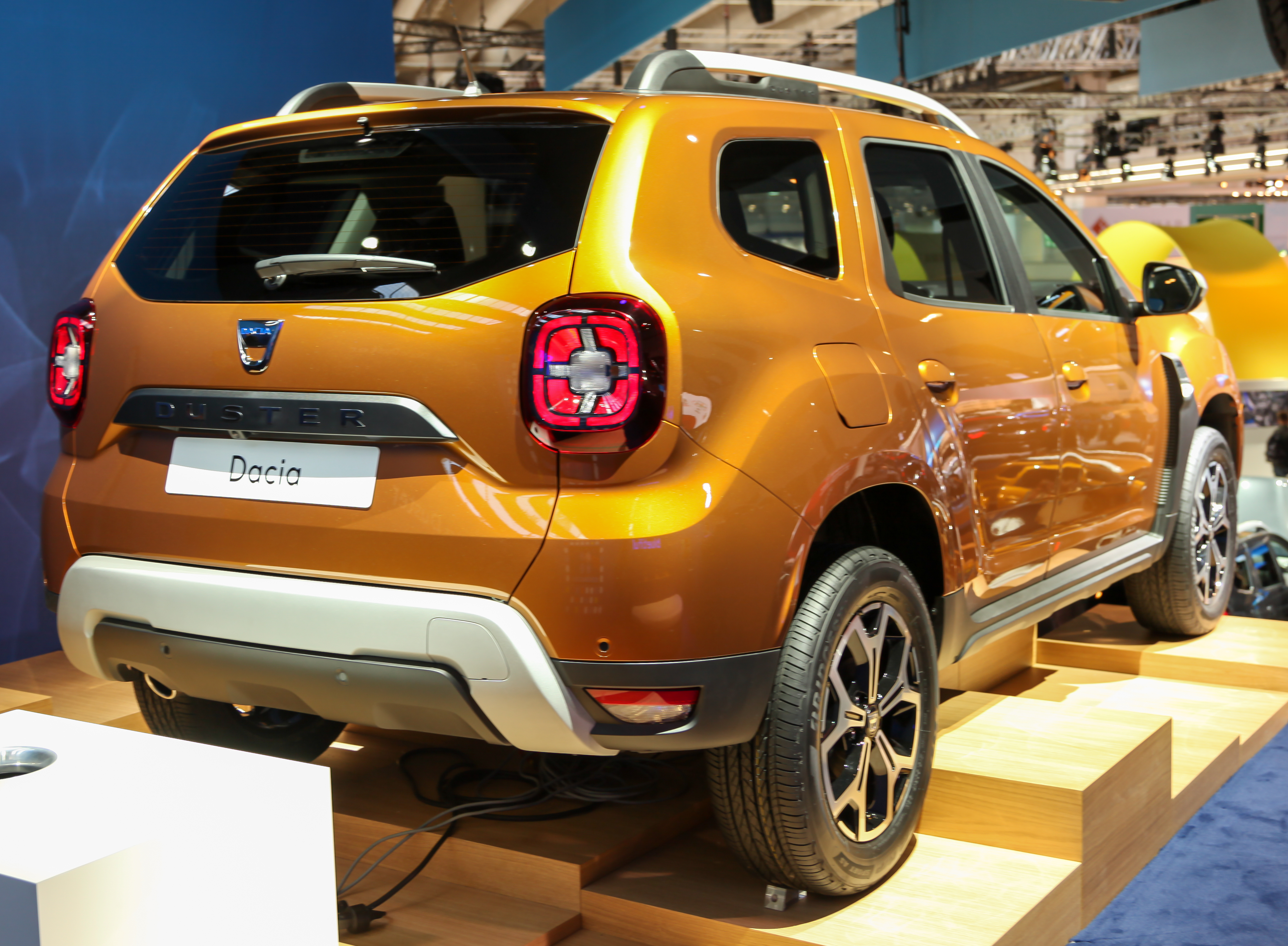 Dacia Duster